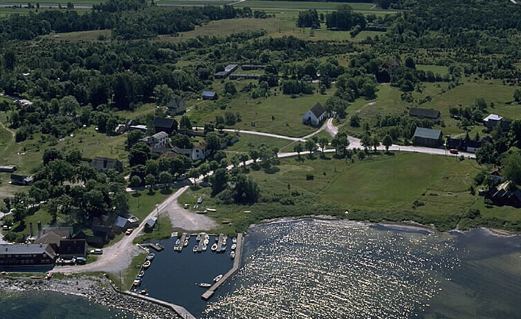 Strandremsan naturreservat. Motiv: Katthammarsvik Nyckelord: Flygbilder, Naturreservat, Riksintressen Kategori: Kust- och skärgårdsmiljöStrandremsan naturreservat.